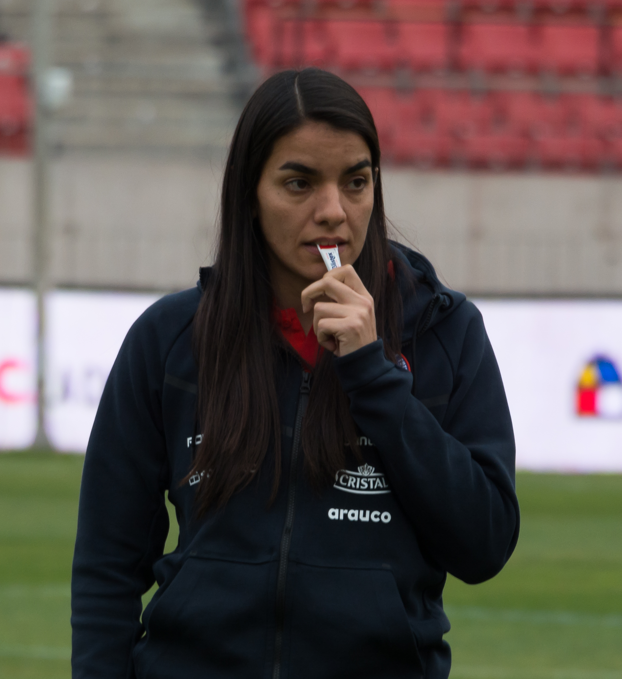 Natalia Campos, Chile v Colombia, Estadio Nacional, Ñuñoa, Santiago, Chile.